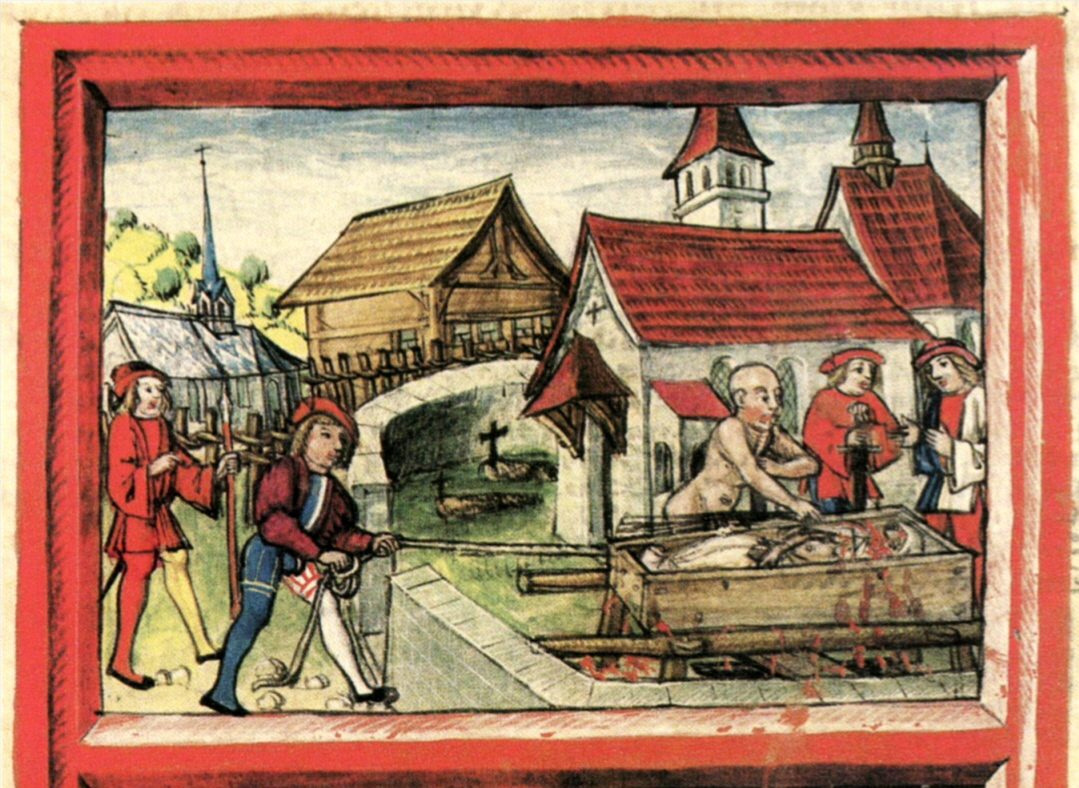 Der Söldner Hans Spiess wird in Ettiswil durch eine Bahrprobe des Mordes „überführt“ (die Leiche seiner Frau beginnt bei Berührung zu bluten). Ausschnitt aus einer Buchmalerei in der Luzerner Chronik des Diebold Schilling